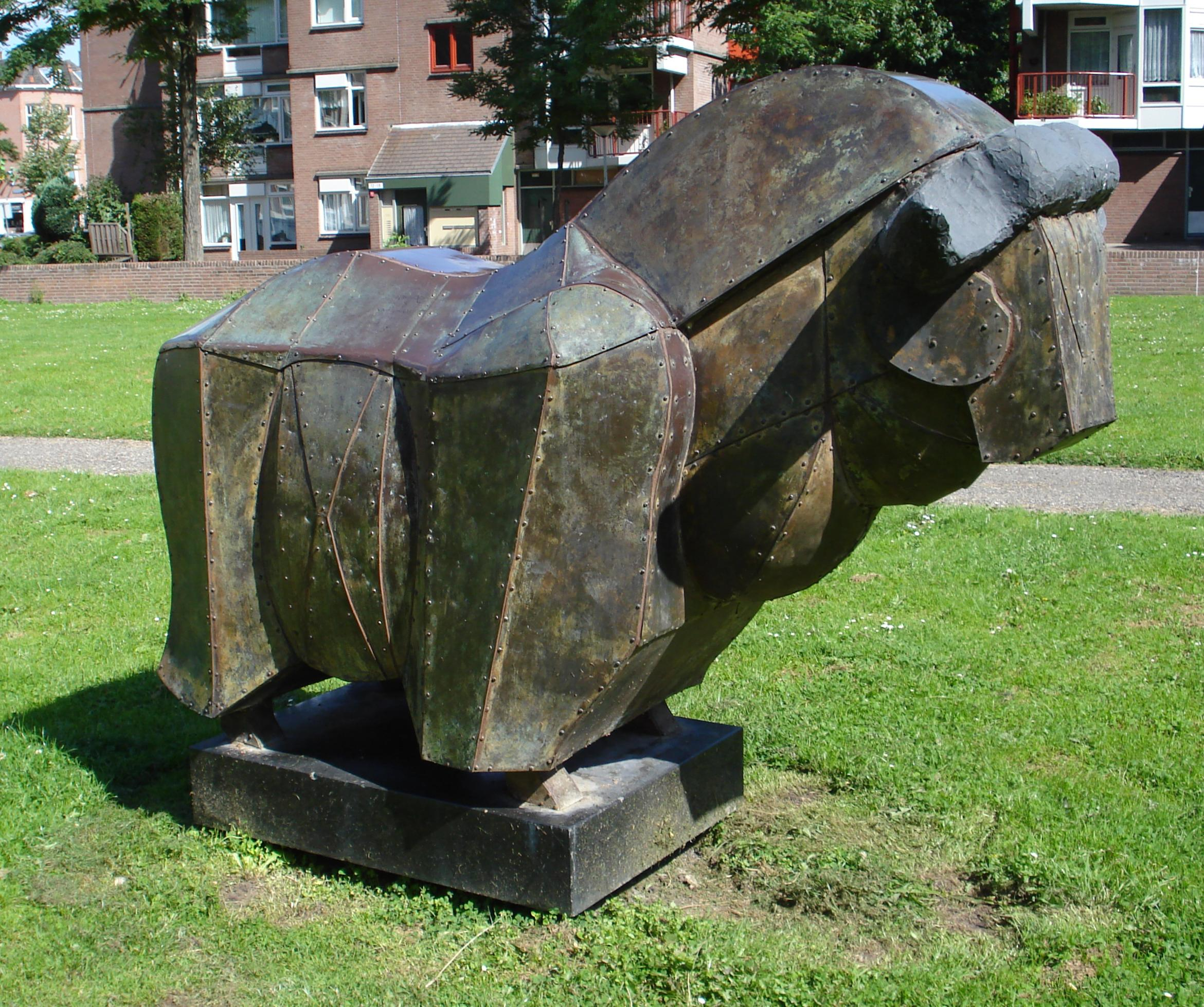 Rotterdam Crooswijk, Koeweide. Kunstwerk "Muskusos" van Tom Waakop Reijers. Rotterdam/The Netherlands.